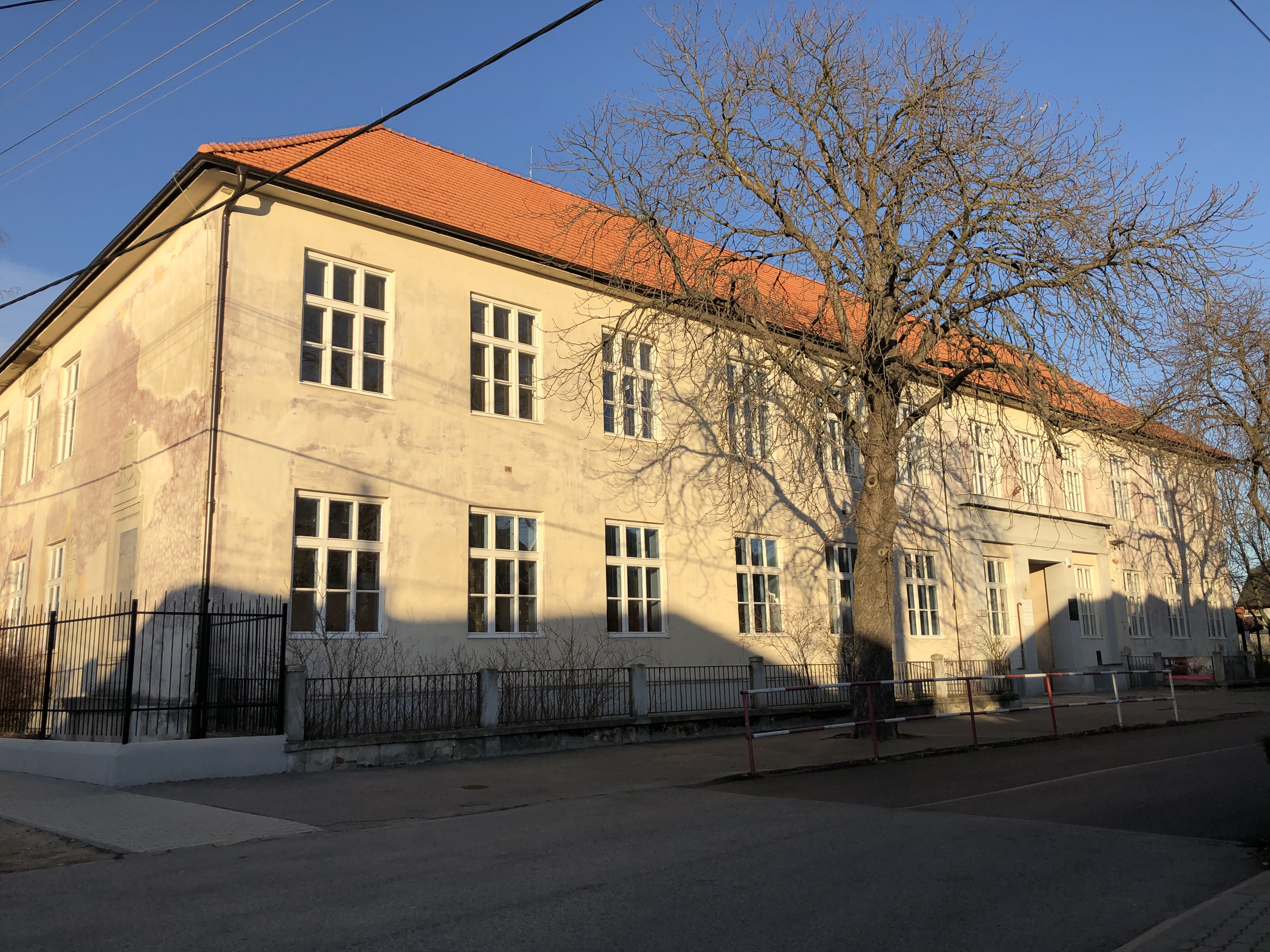 Múzeum školstva a pedagogiky Charkovská 1, Bratislava